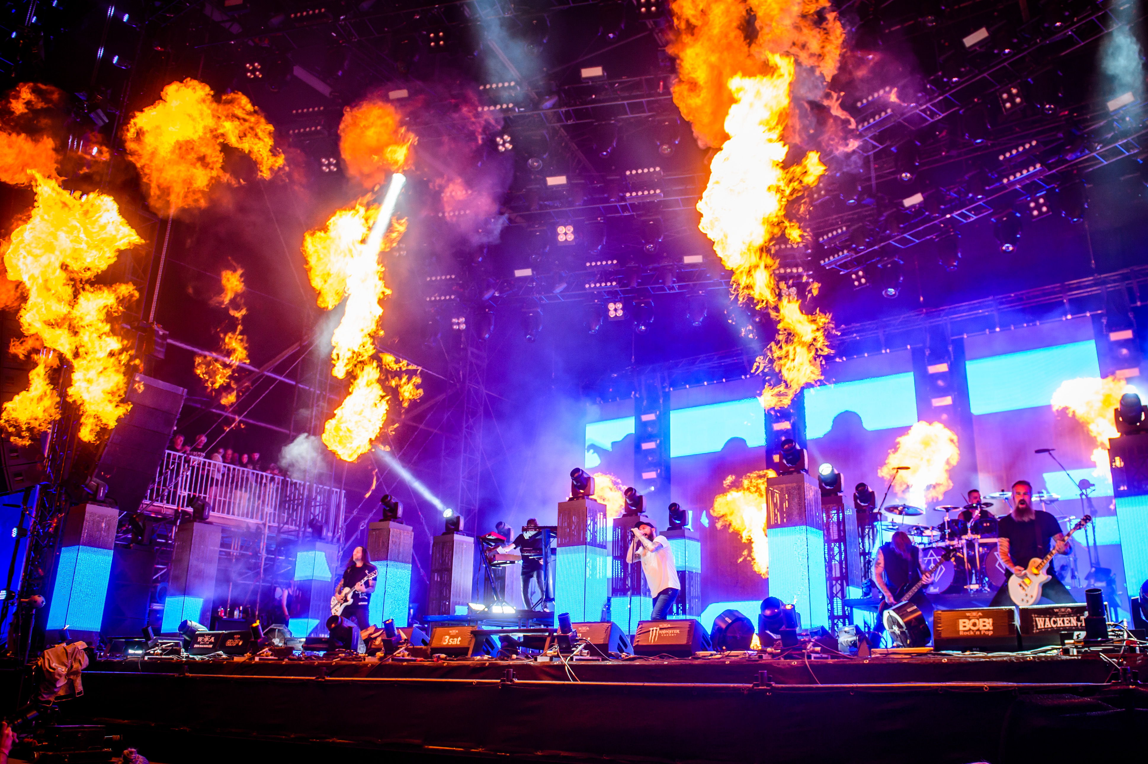 'Wacken Open Air 2018': 'In Flames'